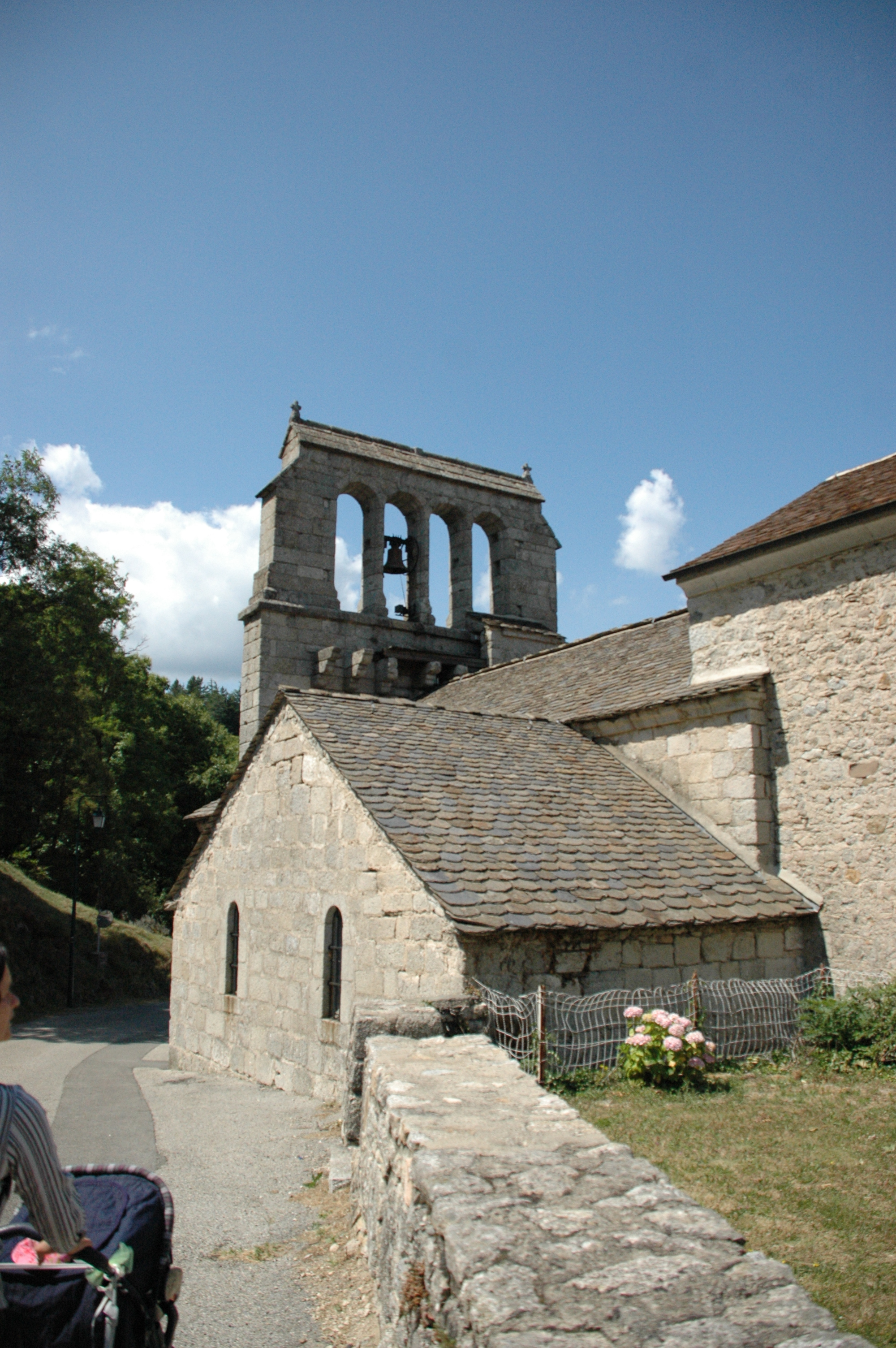 Clocher à peigne, très caractéristique. Camera: Nikon D70 License on Flickr (2011-02-15): CC-BY-SA-2.0 Flickr tags: lozère, vacances, 2009, lozere, holidays, le bleymard